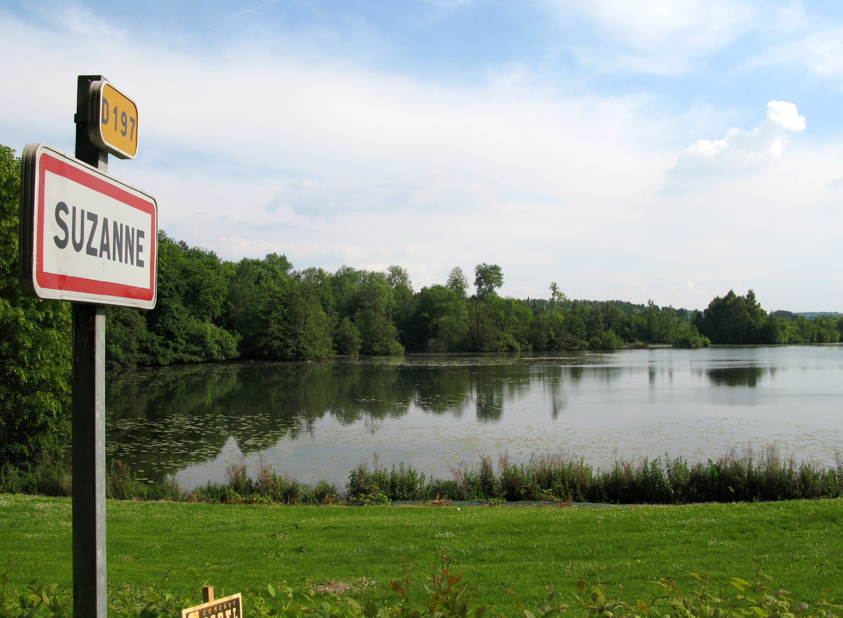 Suzanne (Somme, France) - Panneau à l'entrée du village et étang.